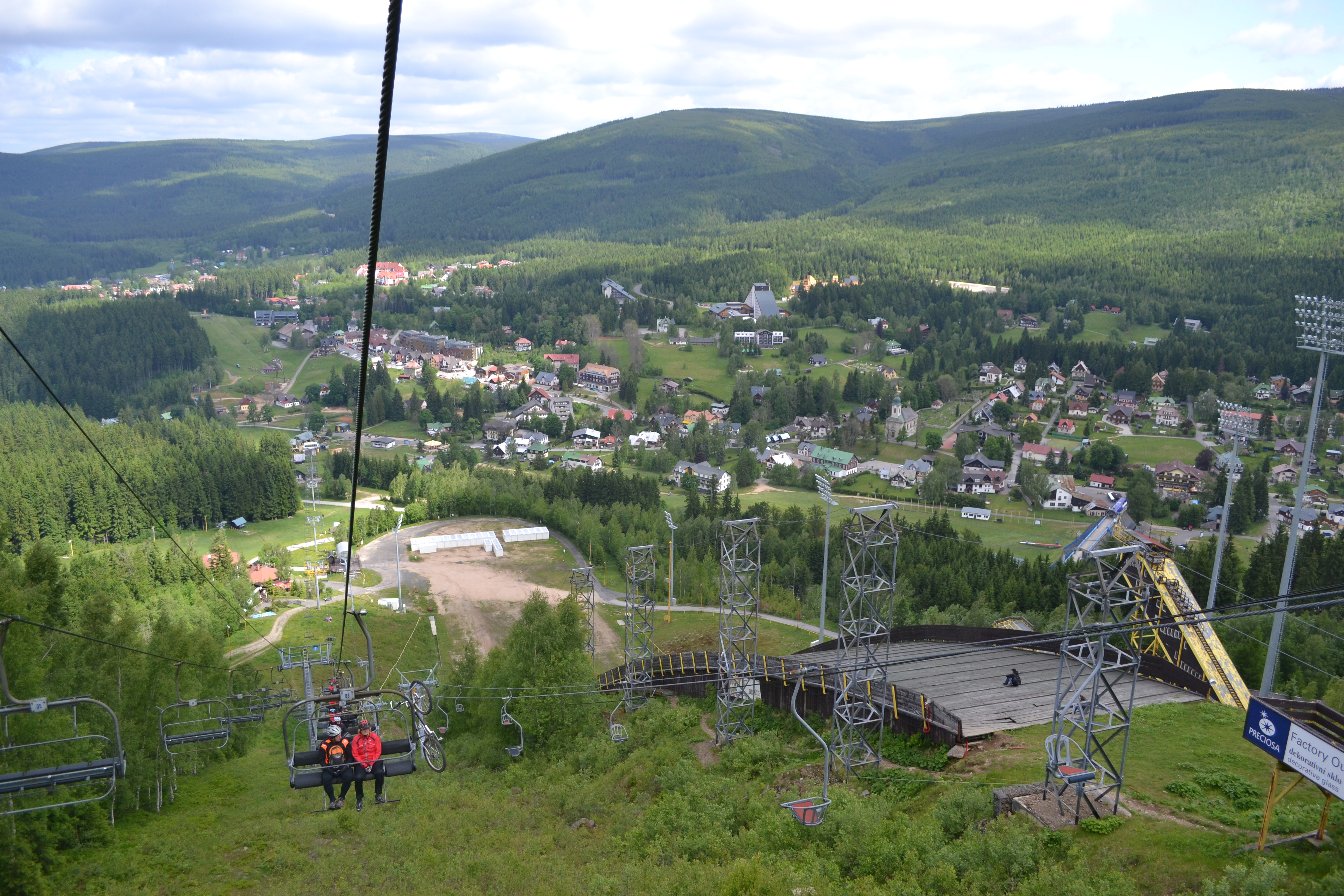 Cyklo - Čertova hora - Harrachov